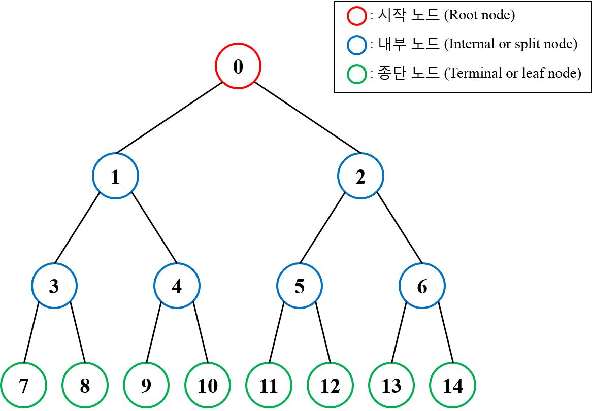 한국어 (조선): 하나의 트리